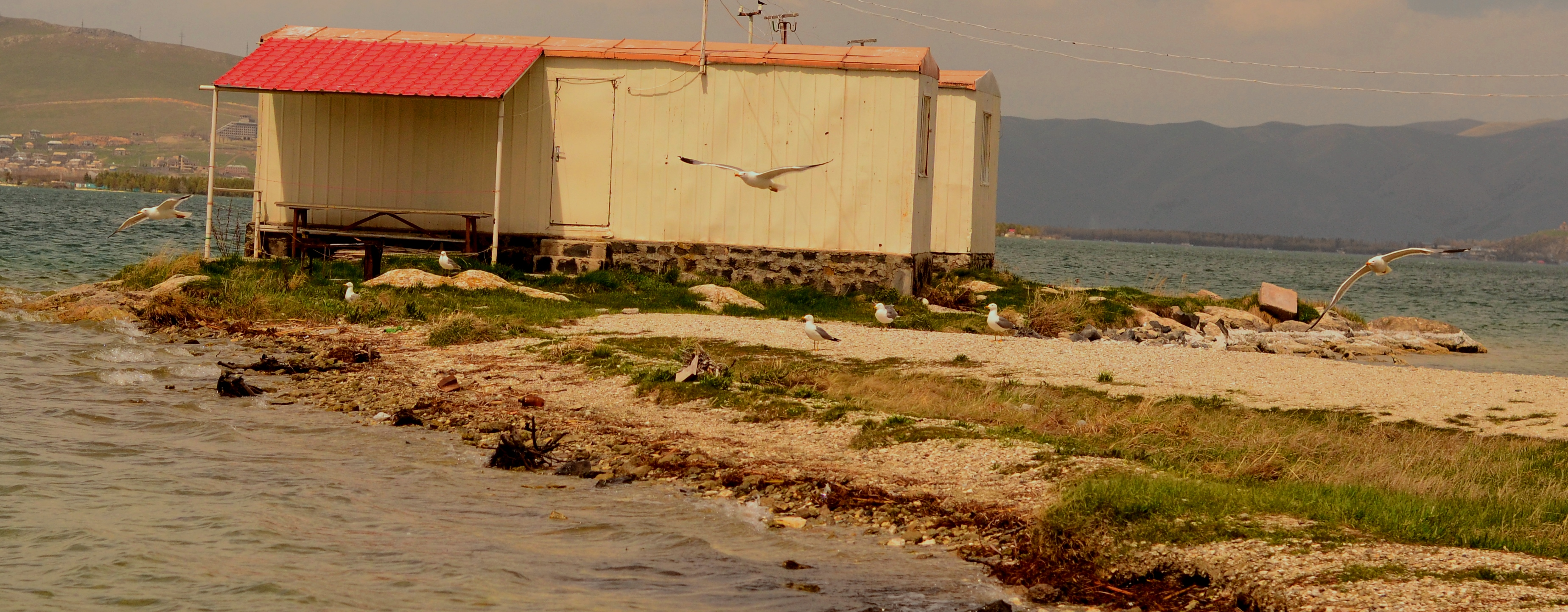 Հայաստան Սևանա լիճ